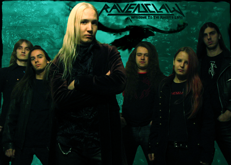 Ravenclaw promo 2007